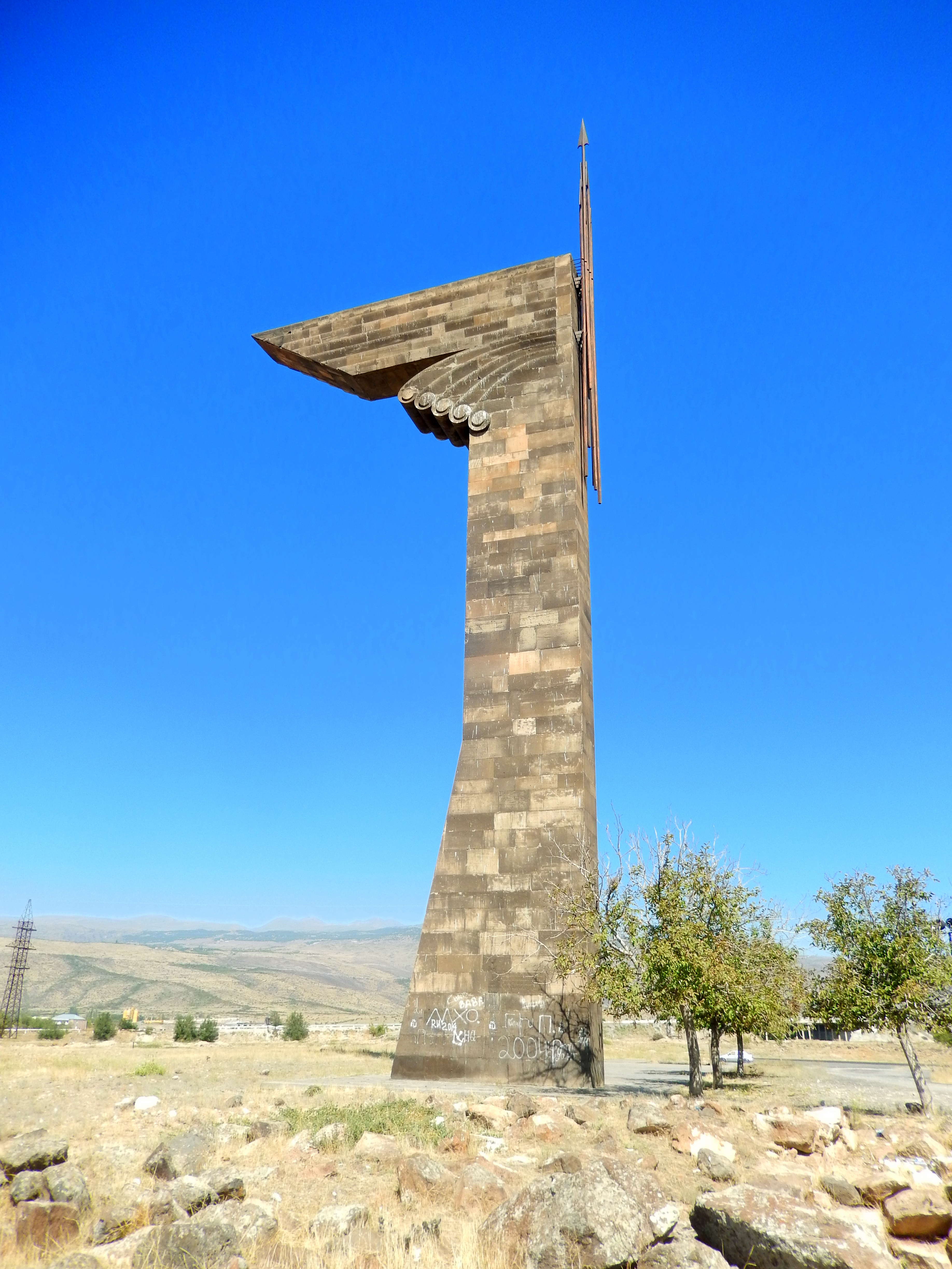 Արծիվ Վասպուրականի 5/2